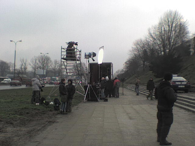 Plan Filmowy Serialu Determinator w Lublinie